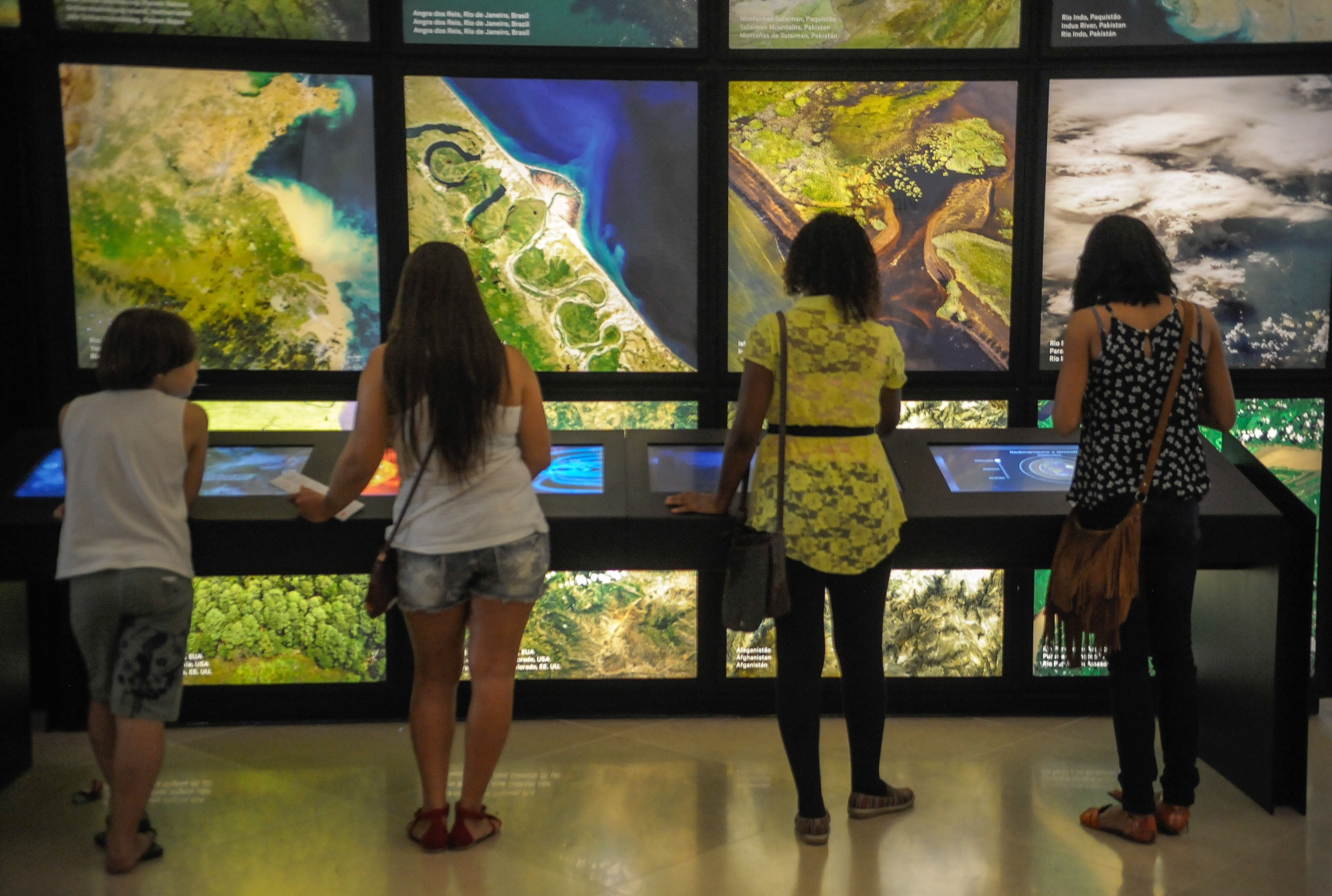 Rio de Janeiro - Para celebrar a inauguração do Museu do Amanhã, na Praça Mauá, aberto pela primeira vez ao público neste fim de semana, a Prefeitura do Rio realiza o Viradão do Amanhã